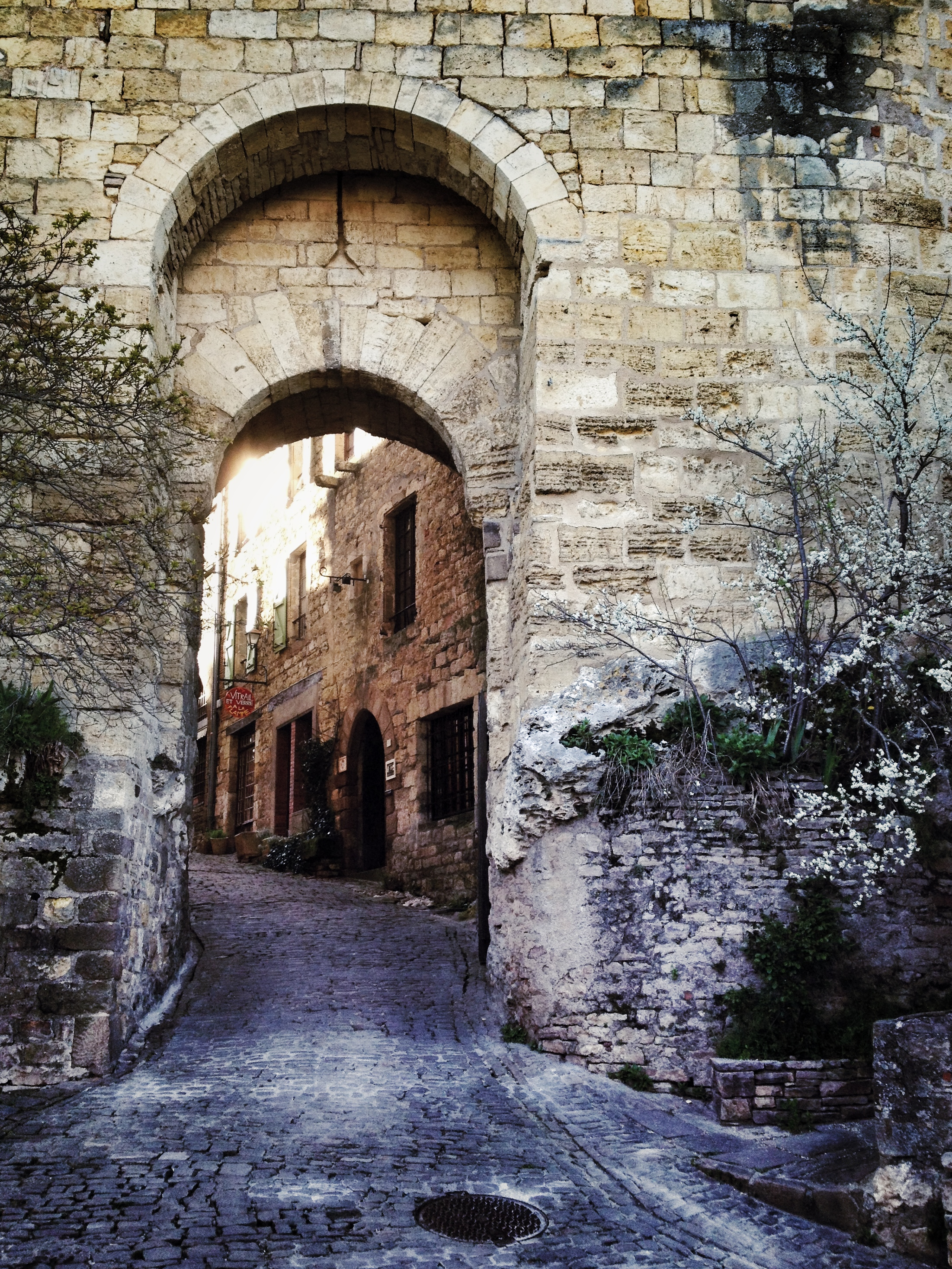 Vue de Cordes-sur-Ciel, Tarn, France